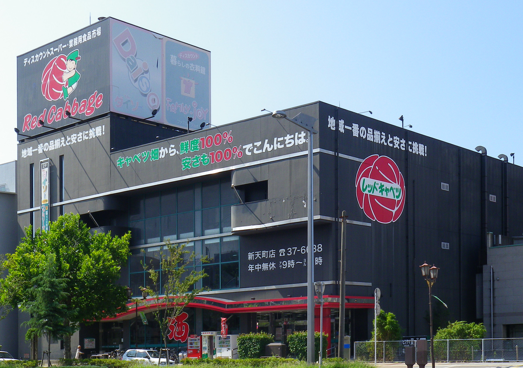 山口県宇部市。レッドキャベツ宇部新天町店。